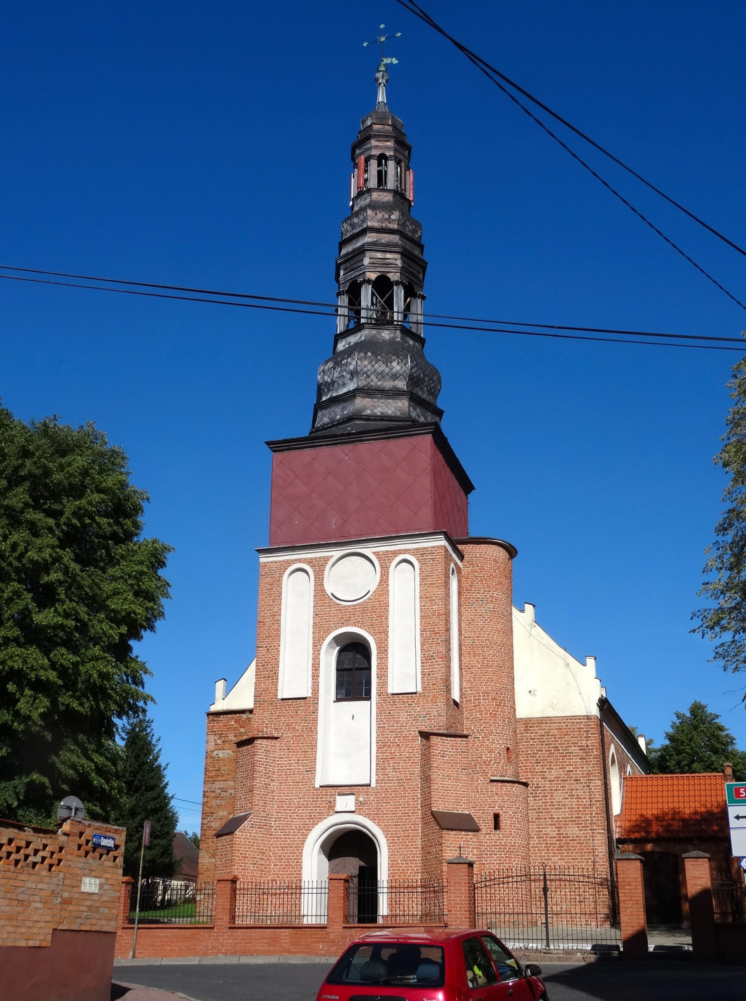 Koronowo, kościół fil. p.w. św. Andrzeja, kon. XIV, XVI